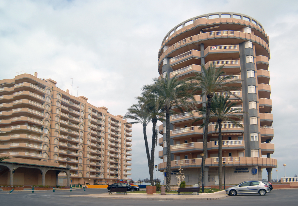 AV Gran Via de La Manga